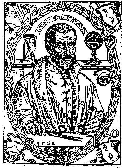 Jean Taisnier. Gravure ancienne. Pas de copyright connu.